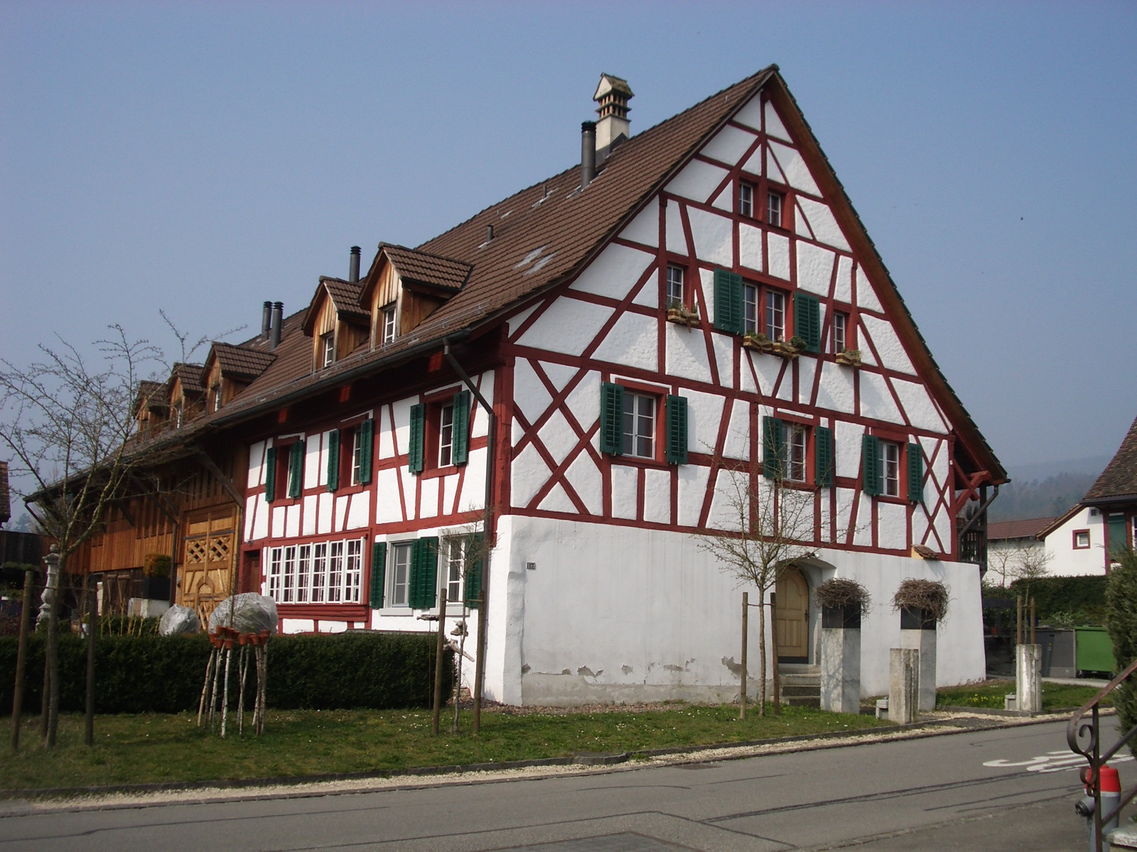 Otelfingen ZH, Switzerland